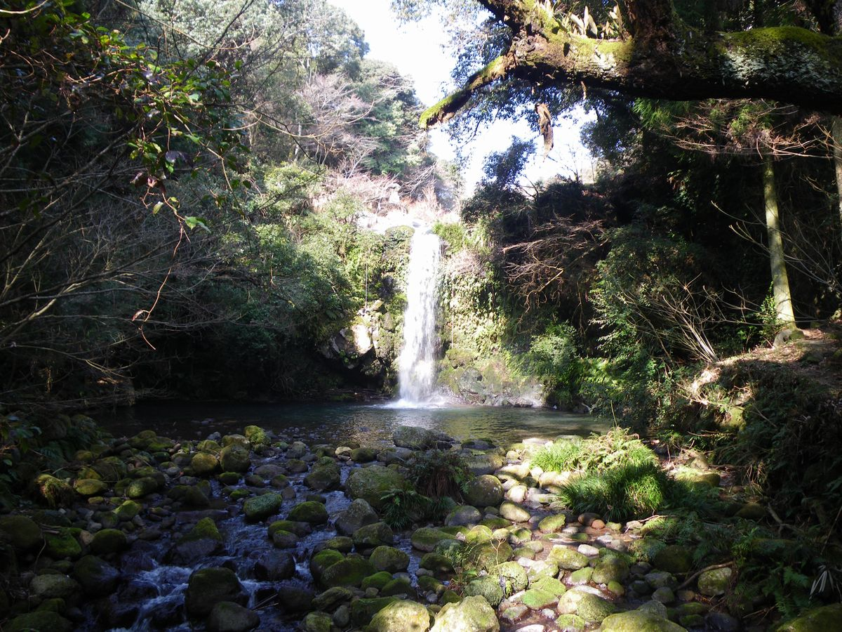 有家川・鮎帰りの滝。長崎県南島原市（Ayugaeri-no-taki, Arie river, Minami-shimabara, Nagasaki）